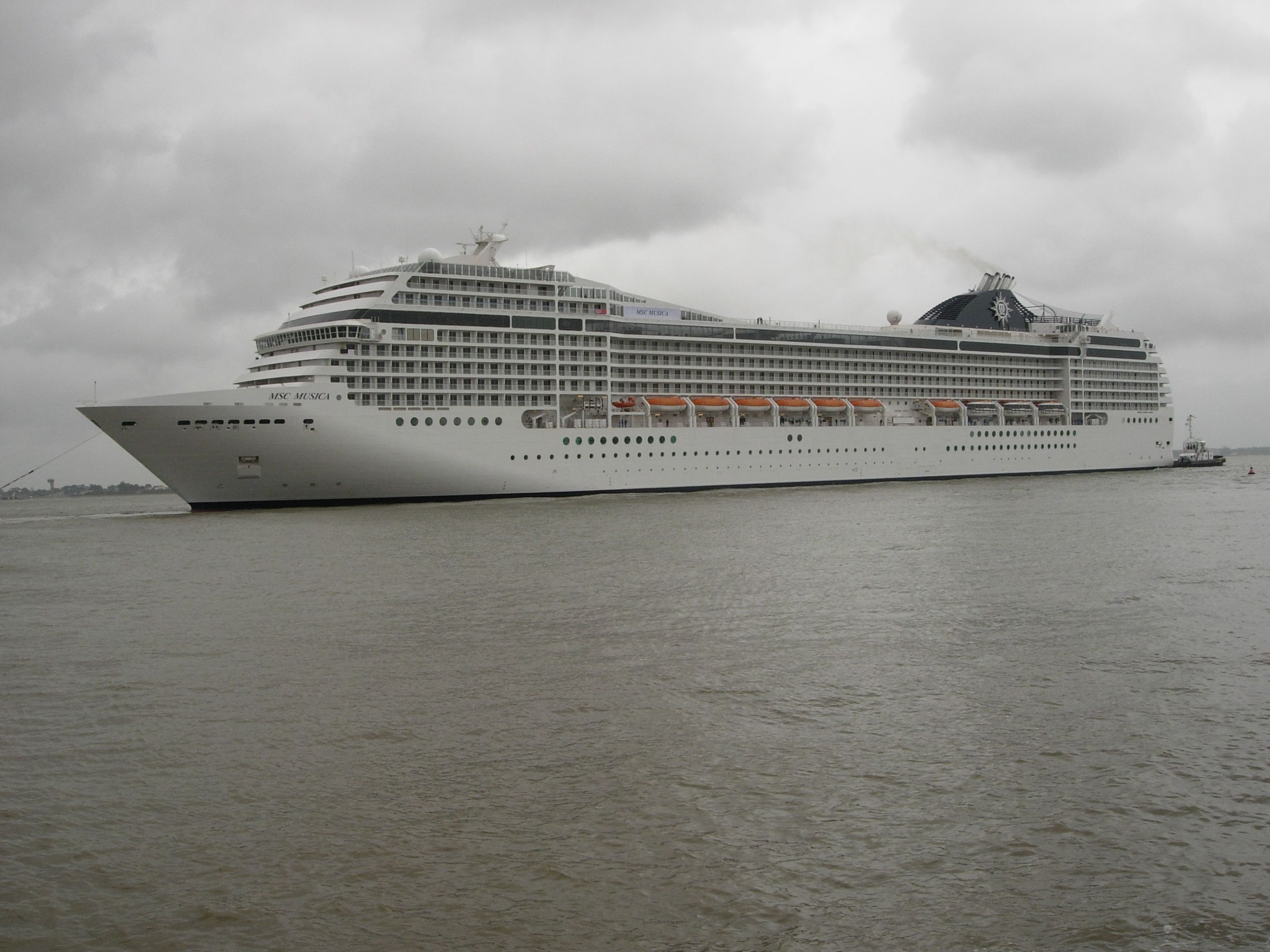 Photo personnelle, prise le jour de la livraison du paquebot MSC Musica à Saint-Nazaire, France. IMO Number: 9320087 MMSI Number: 352003000 Callsign: 3EFK6 Length: 294 m Beam: 32 m